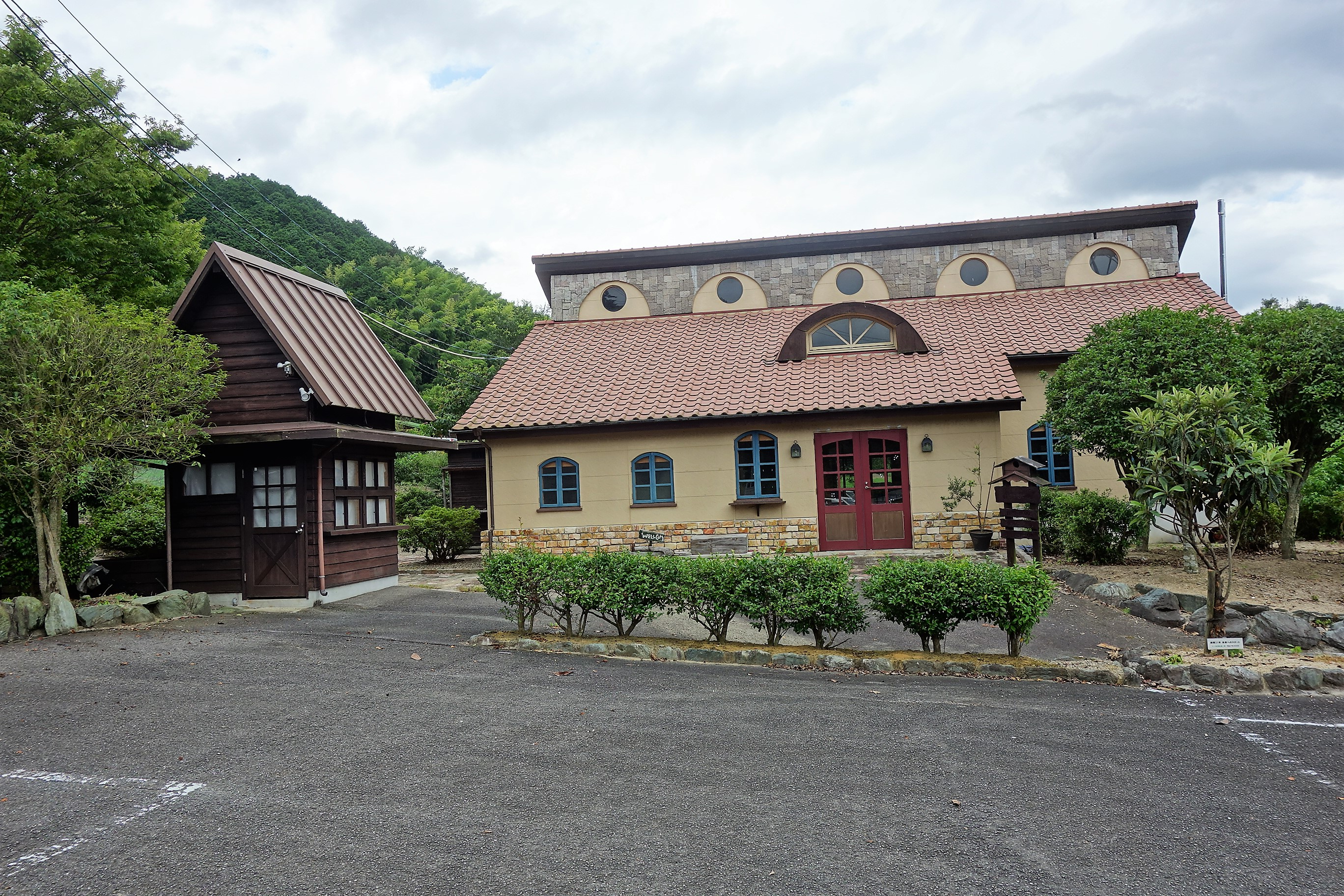 市倉ファーム跡に残るレストラン 旧いちくらカフェとしても使われた。愛媛県西条市。